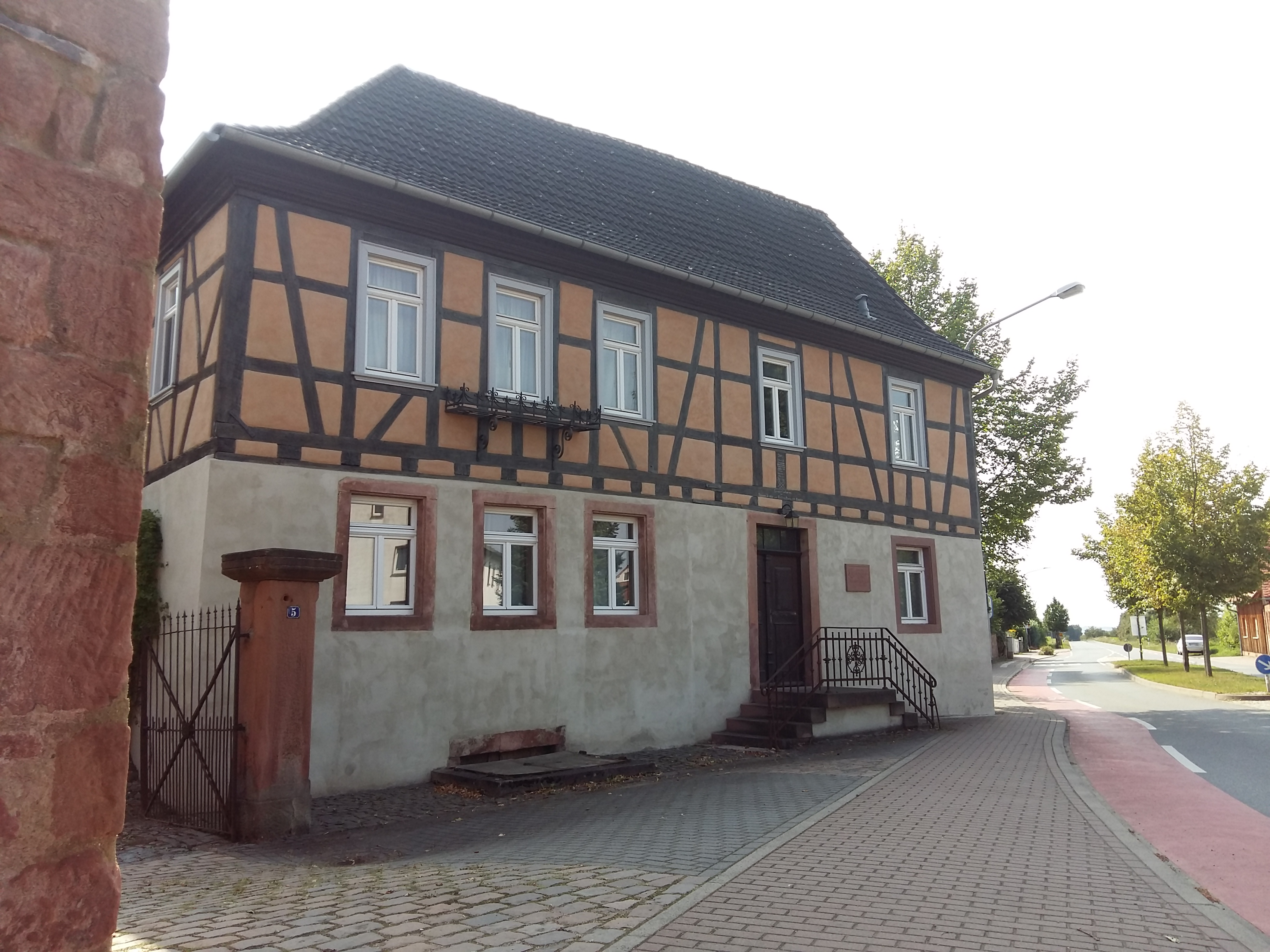 Gastof Becker in der Hauptstraße 5 in Lengfeld Zipfen. Gründungsort des Odenwaldklubs.